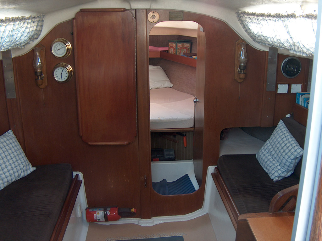 interni Trident 80